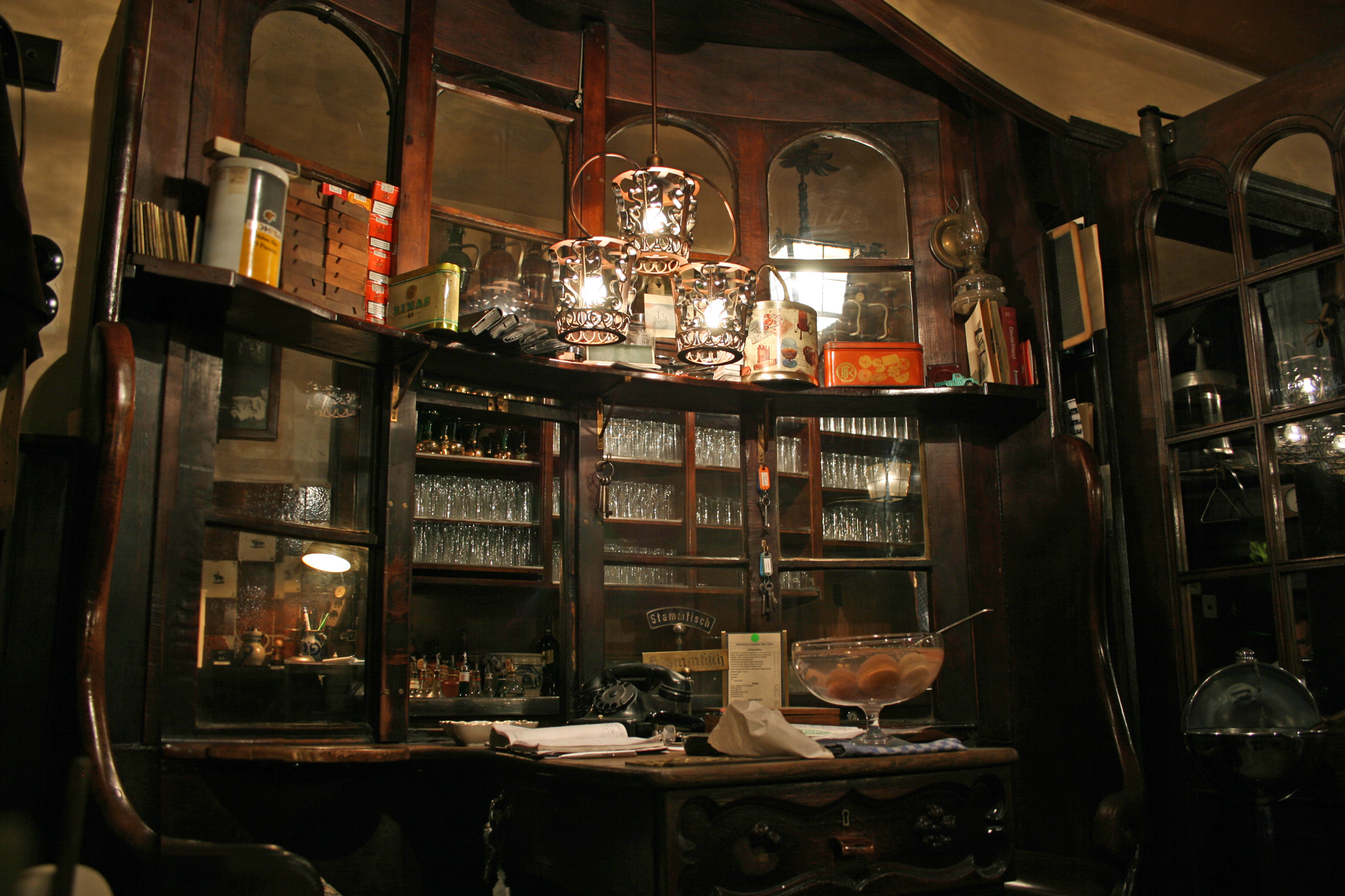 "Beichtstuhl" in cologne pub Haus Töller